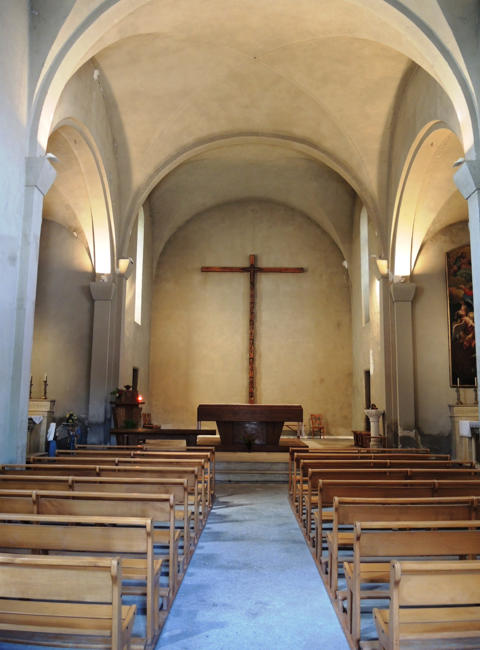 Colombier-le-Cardinal détail